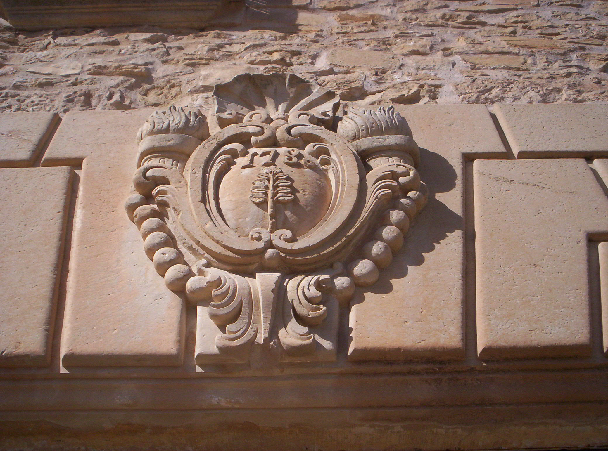 Escudo Casa Llorach, en Omellóns (Lérida, España)